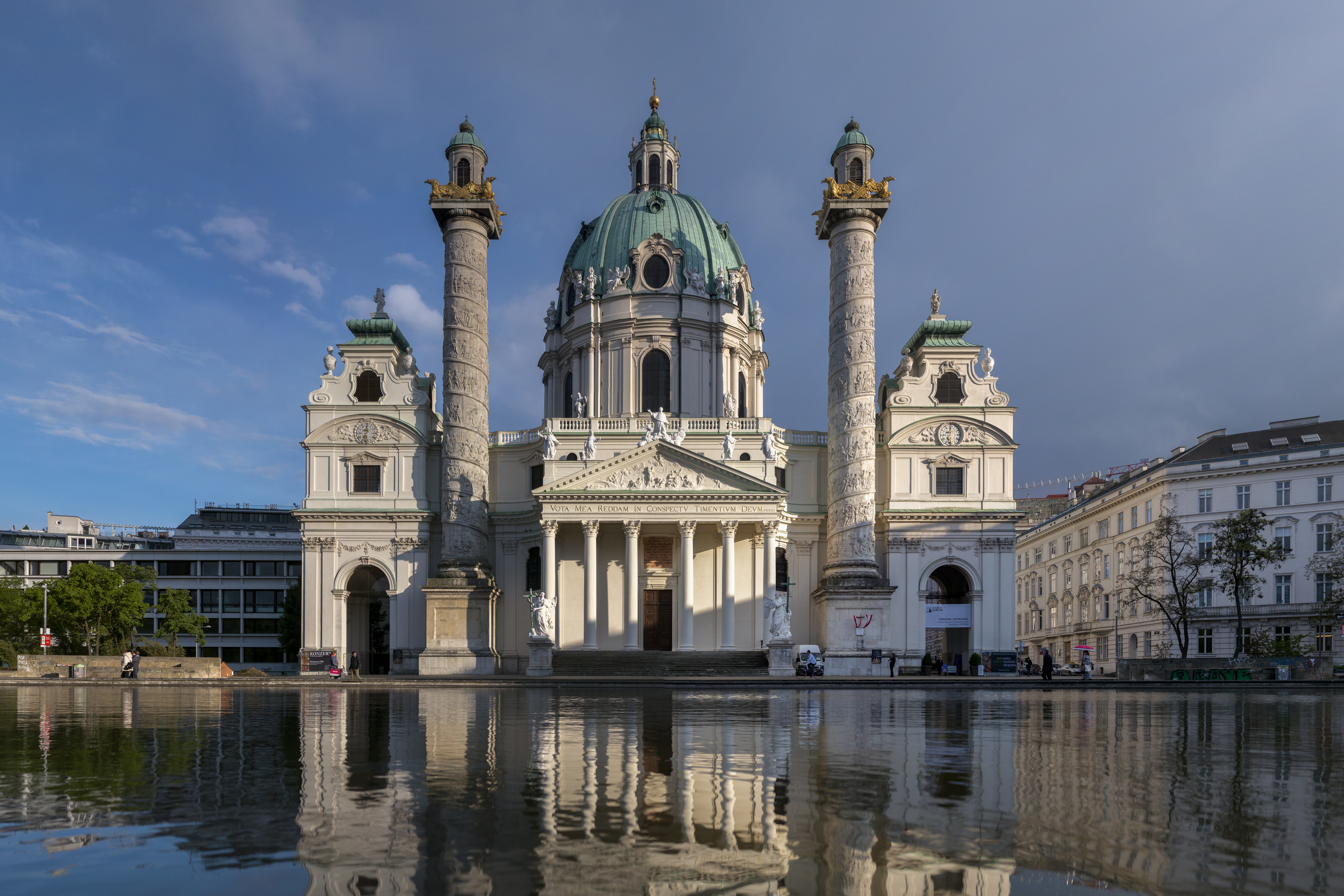 Karlskirche Abendsonne